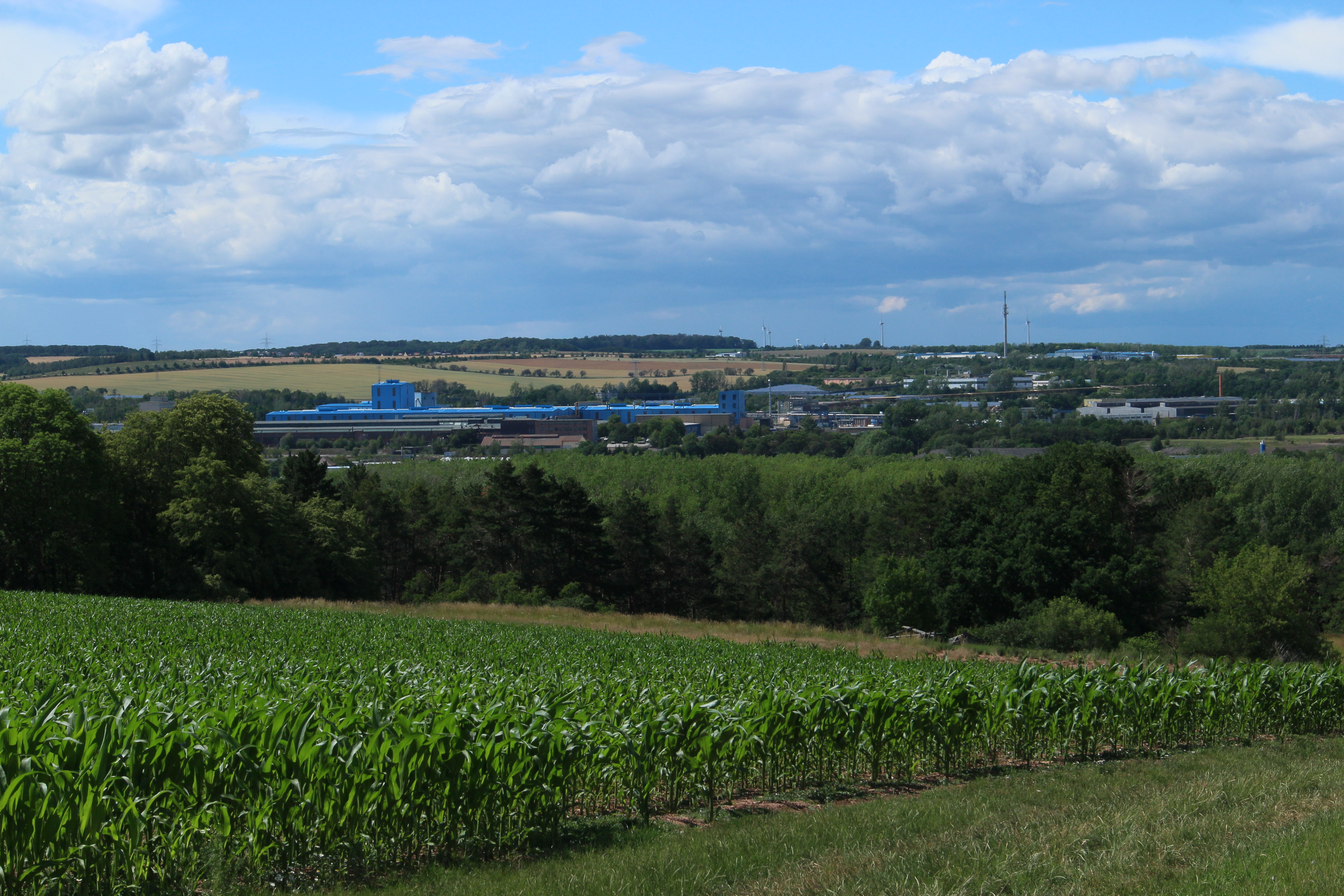 Blick auf die Mansfelder Kupfer und Messingwerke (KME) in Hettstedt aus Richtung des Feldweges zwischen Altdorf und Thondorf